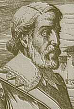 Amador Bueno em litografia do século XVIII.